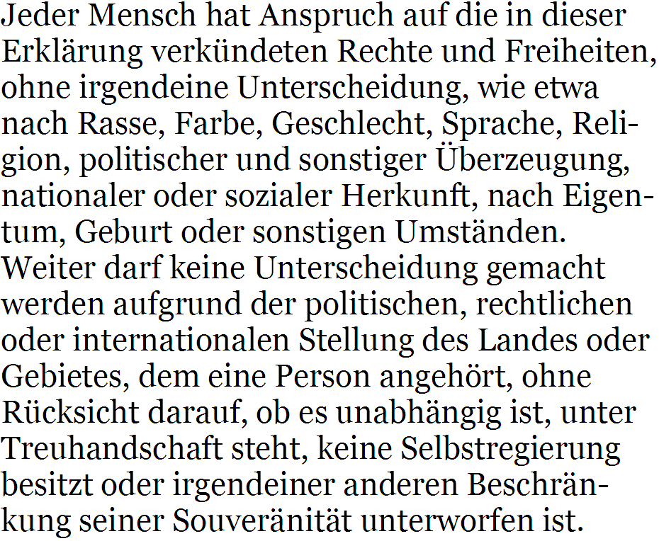 Textbeispiel Großschreibung, der Text aus der Allg. Erklärung der Menschenrechte